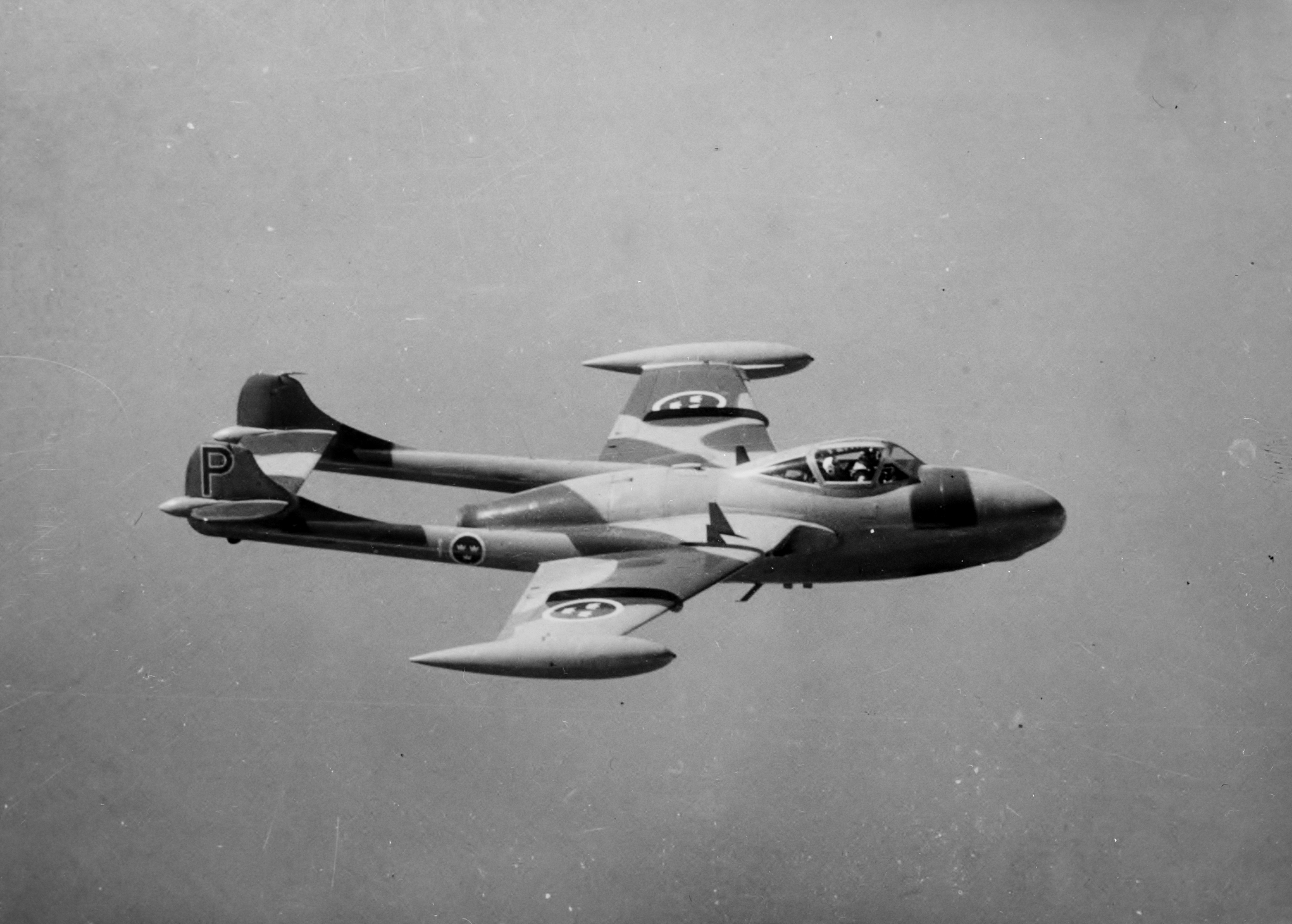 Motiv: Flygplan J 33, de Havilland DH 112 Venom Mk 51, tillhörande F 1 Hässlö i luften. Tillhör Gamla Malmen-samlingen. GM 963.Ur Flygvapenmuseums bildarkiv.